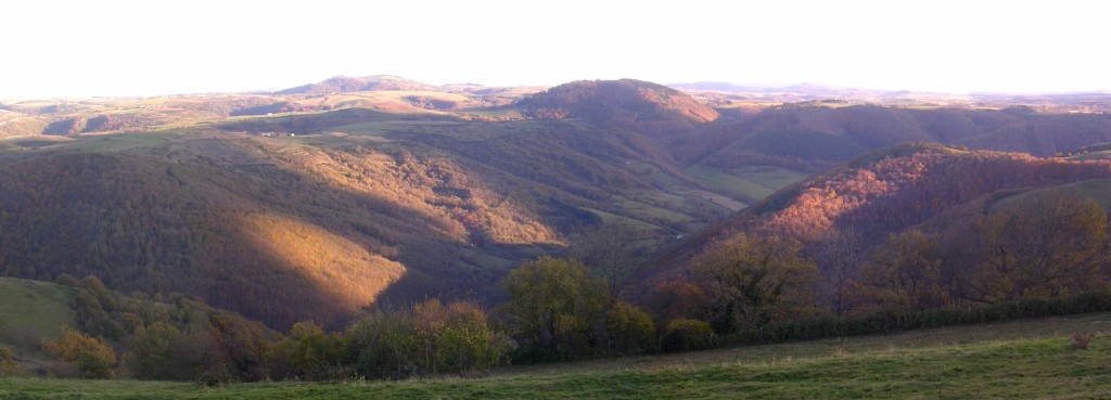 Vue sur la vallée de l'Arcueil et les monts de la Margeride depuis le plateau de Tempel (Bonnac - France)